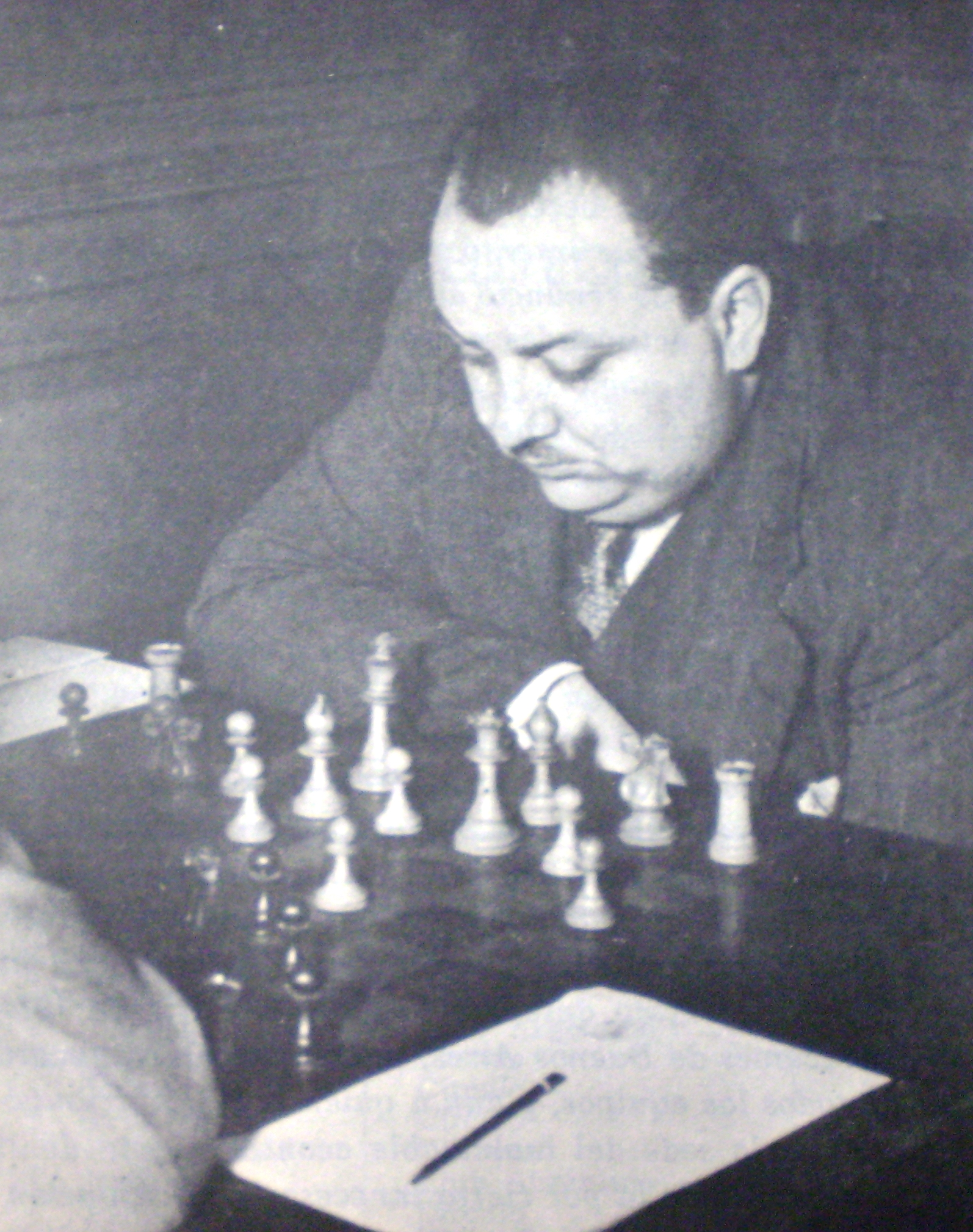 Roberto G. Grau